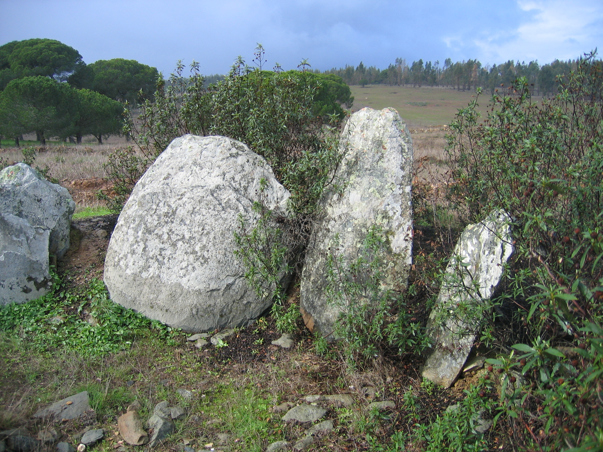 Monte das Boicas, Azinheira dos Barros